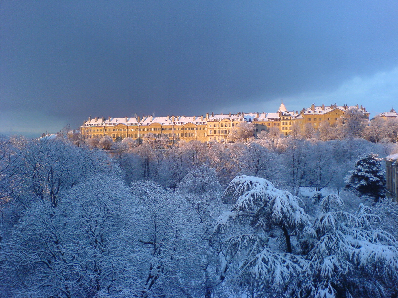 La Ciudad Vieja de Ginebra (Suiza) en un atardecer de invierno.